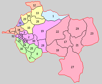 熊本県上益城郡の町村制時点の町村。